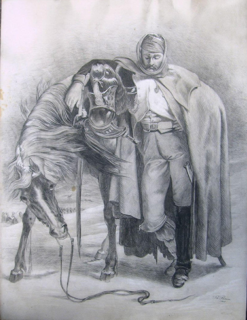 Zeichnung eines Soldaten in Russland